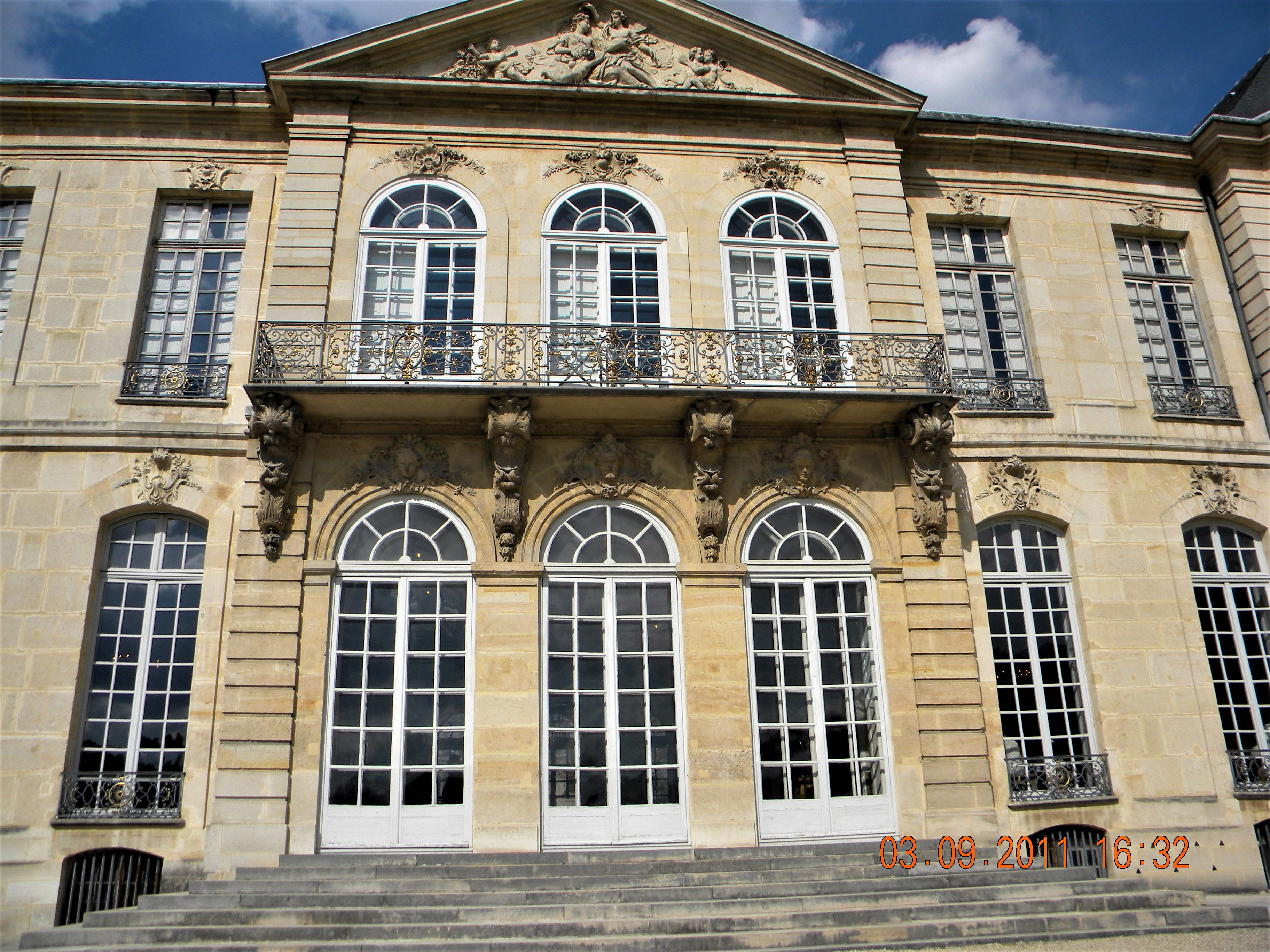 Paris, France. RODIN MUSEUM (Hotel Biron)(Facade).(PA00088697) .